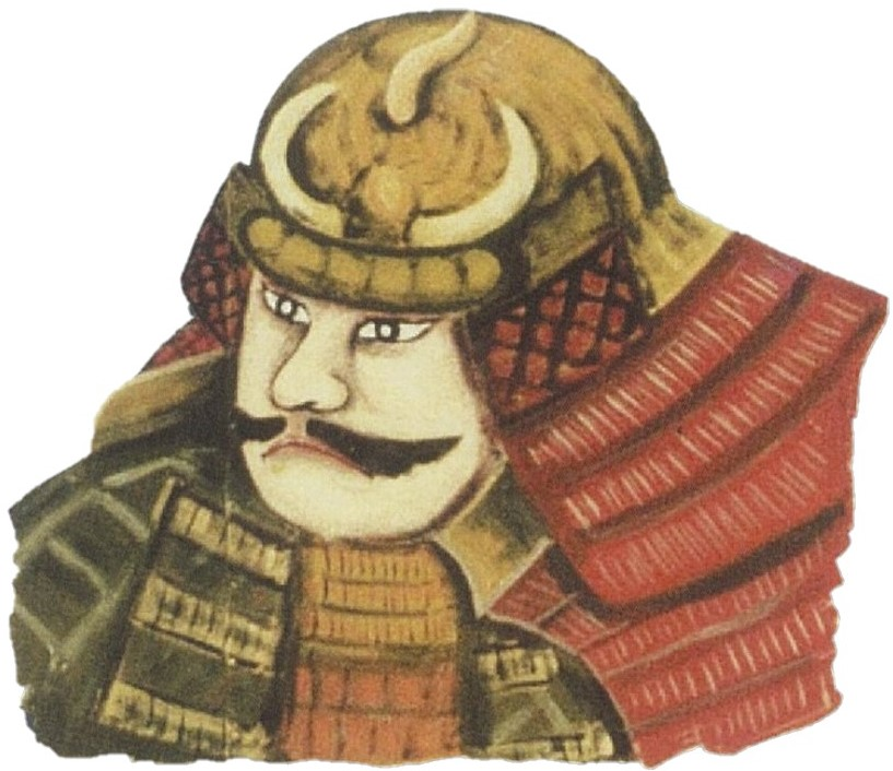 日根野吉明の肖像。